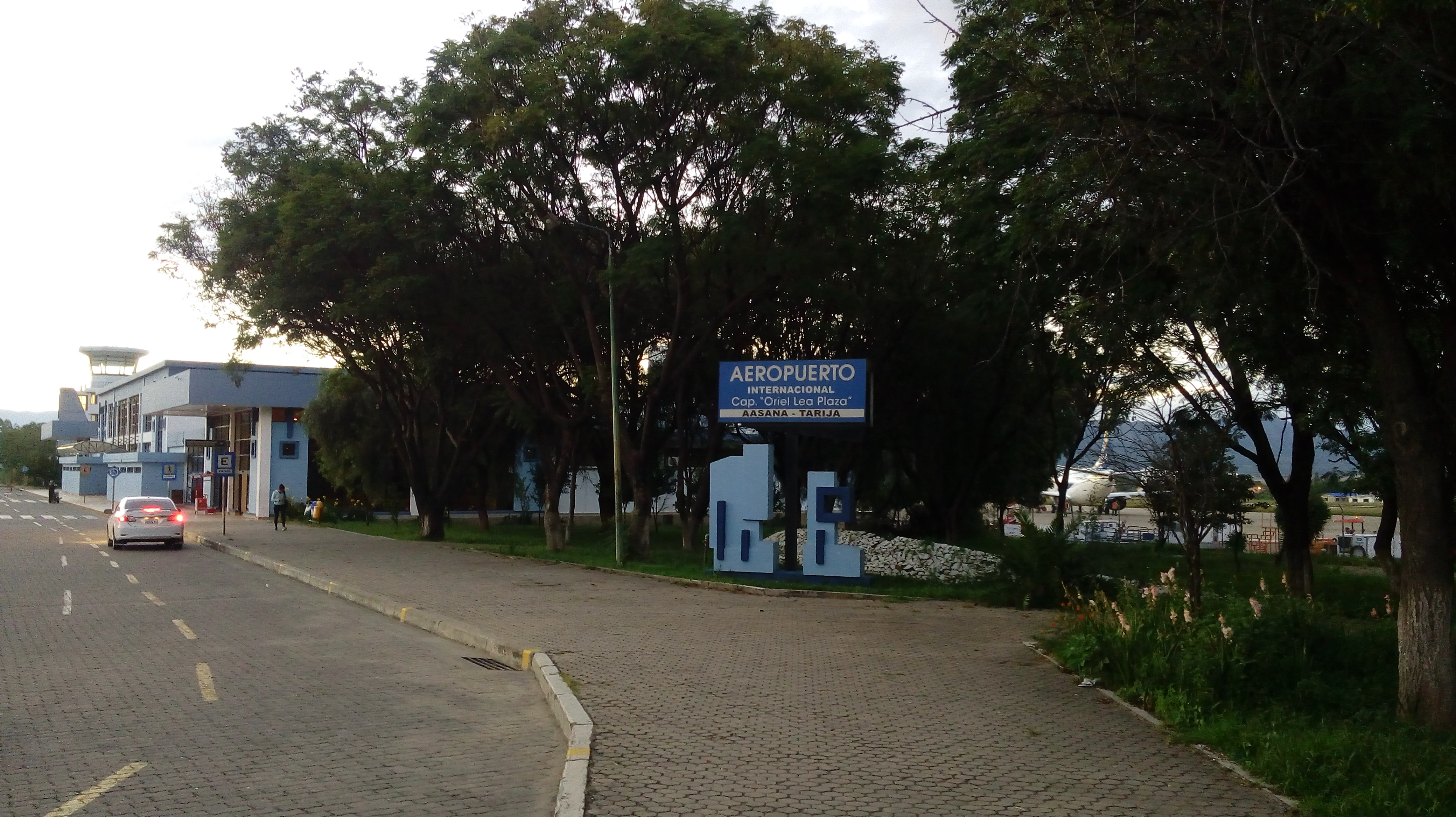 Aeropuerto Tarija samt Flughafengebäude und Rollfeld